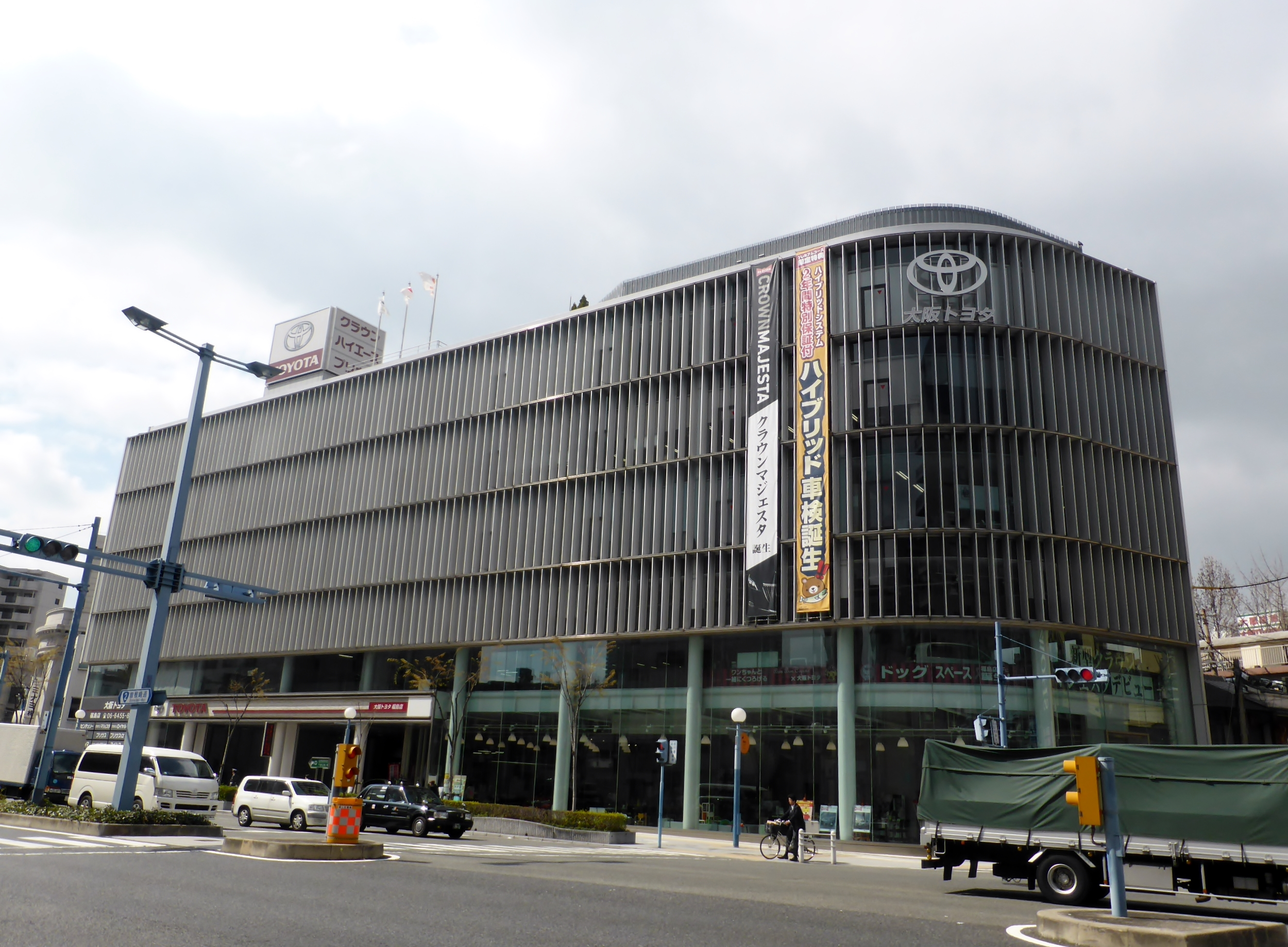 大阪トヨタ自動車本社を撮影